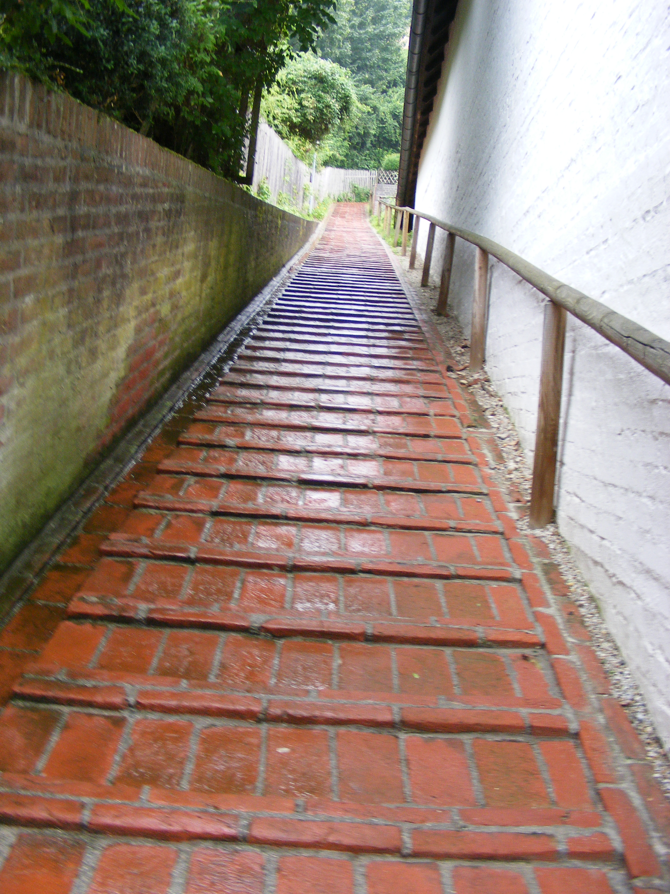 Landshut - Aufgang zur Burg Trausnitz, sog. Ochsenklavier (kleine Stufen verhinderten das Rutschen des Viehs).